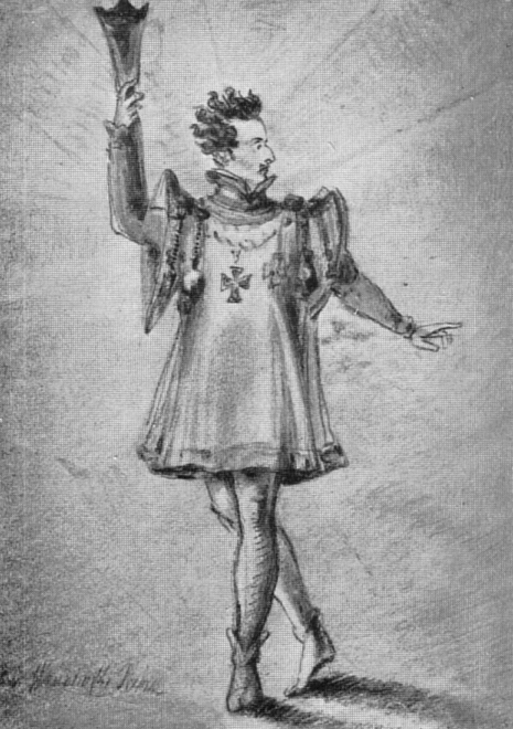 Pius Alexander Wolff als "Standhafter Prinz" in Calderons Drama, Aquarell, Goethe-Nationalmueseum